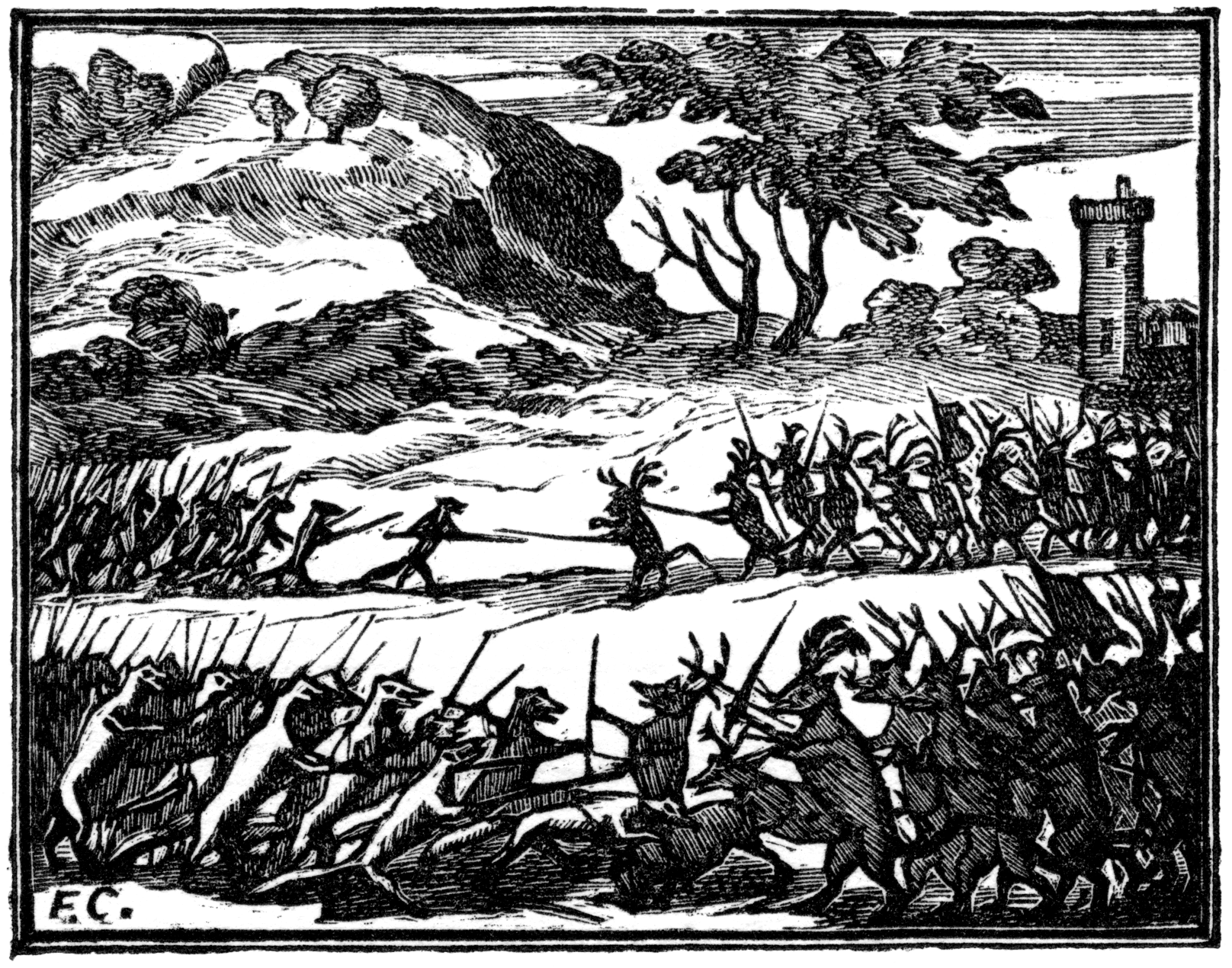 Illustrations pour les « Fables choisies mises en vers par M. de la Fontaine », Claude Barbin et Denys Thierry, Paris, 1668 (premier recueil) 1678-79 (deuxième recueil) 1694 (troisième recueil). Numérotation Charpentier (1705).